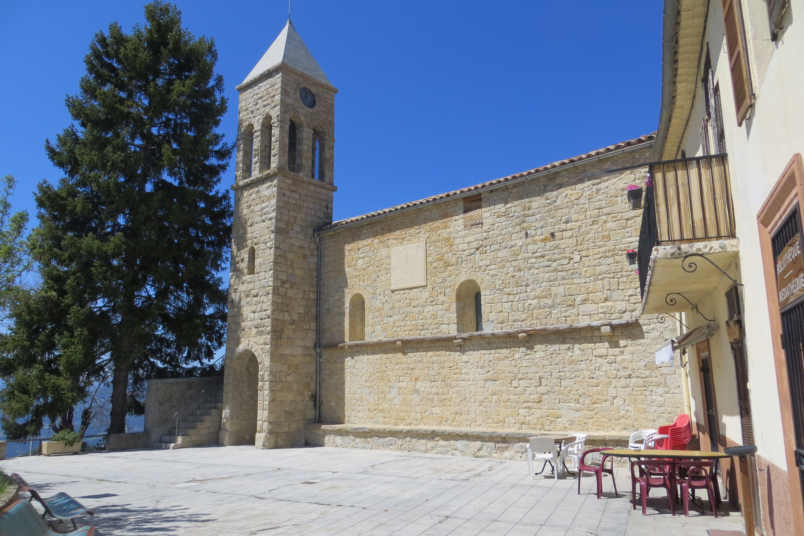 Village d'Ascros (Alpes-Maritimes) : église romane sur la Place du Château